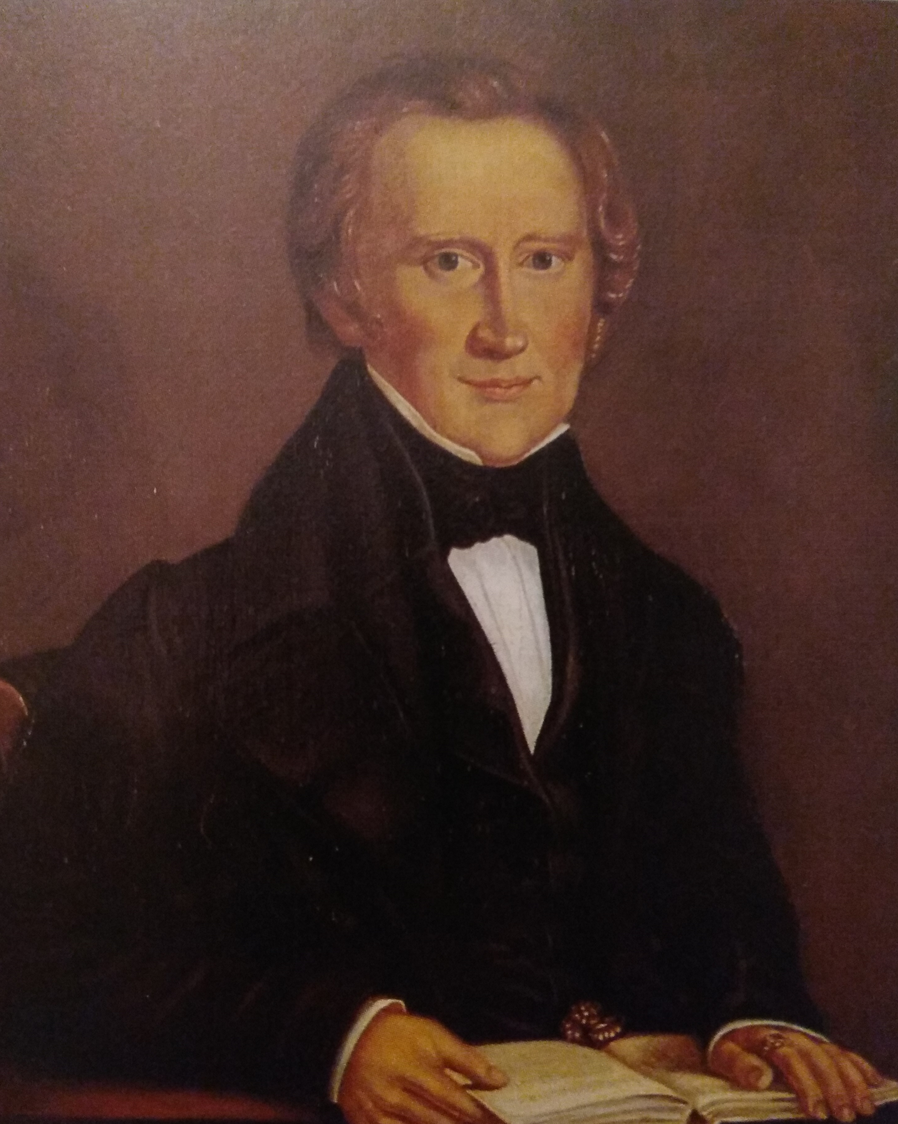 Maler: Anonym Dargestellter: Johann Carl Bertram Stüve (1798-1872) Gemalt: 19. Jh.